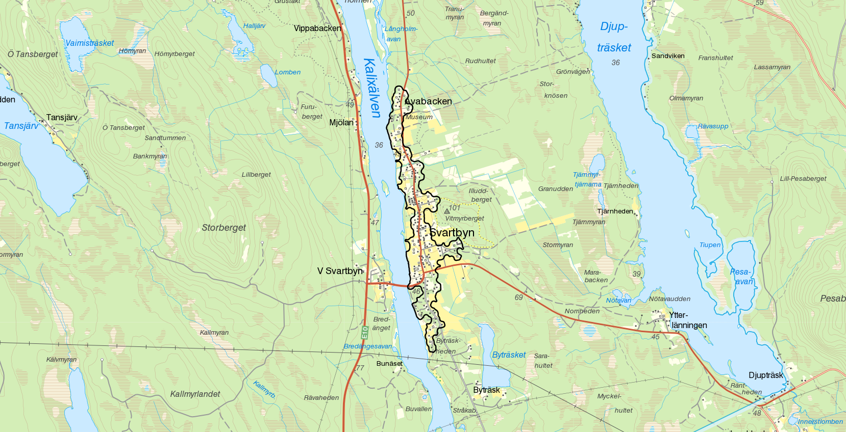 Tätorten Svartbyn med gränserna från Statistiska centralbyråns tätortsavgränsning 2015. Bakgrundskarta från Lantmäteriet, skala 1:30 236.